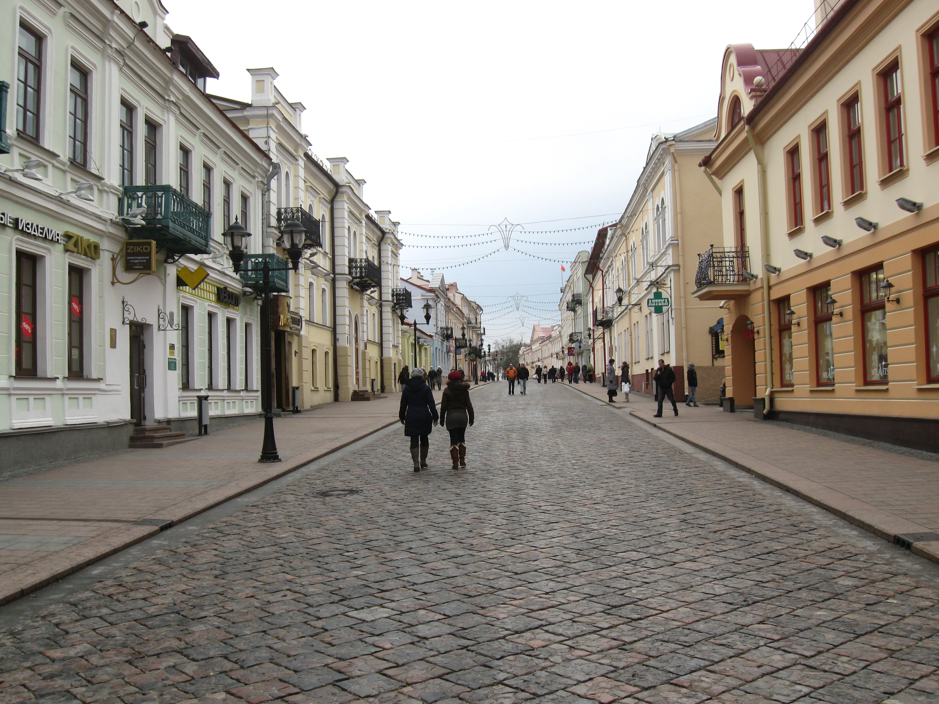 Беларуская (тарашкевіца): Забудова вул. Савецкай. г. Горадня This is a photo of Belarusian heritage monument. Reference number: 412Е000665 ( WLM)